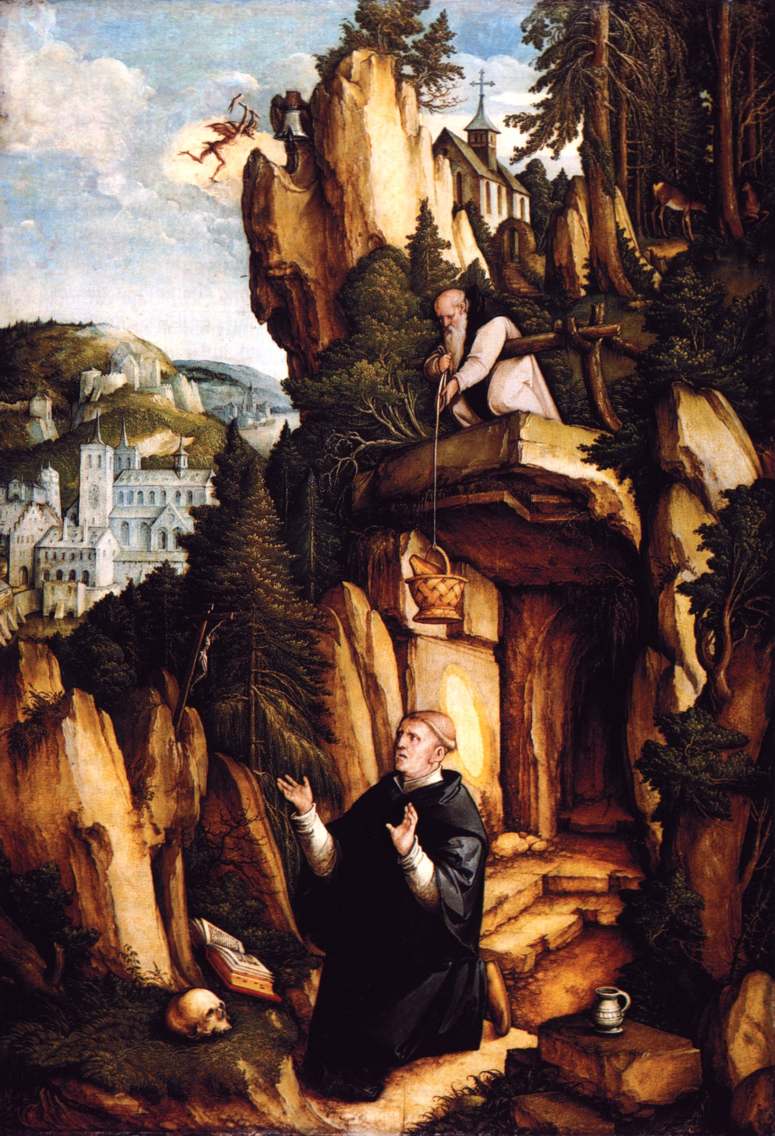 Ausstattung der ehemaligen Seitenaltäre der Meßkircher St. Martinskirche, Einzeltafel: Heiliger Benedikt von Nursia vor seiner Höhle im Gebet